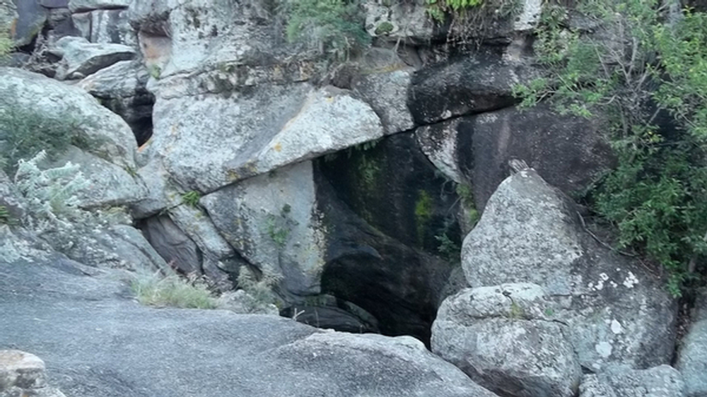 Ingreso a la cueva donde pernoctan los pajaritos en Mallín.